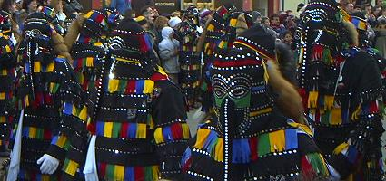 Überlinger Hansele